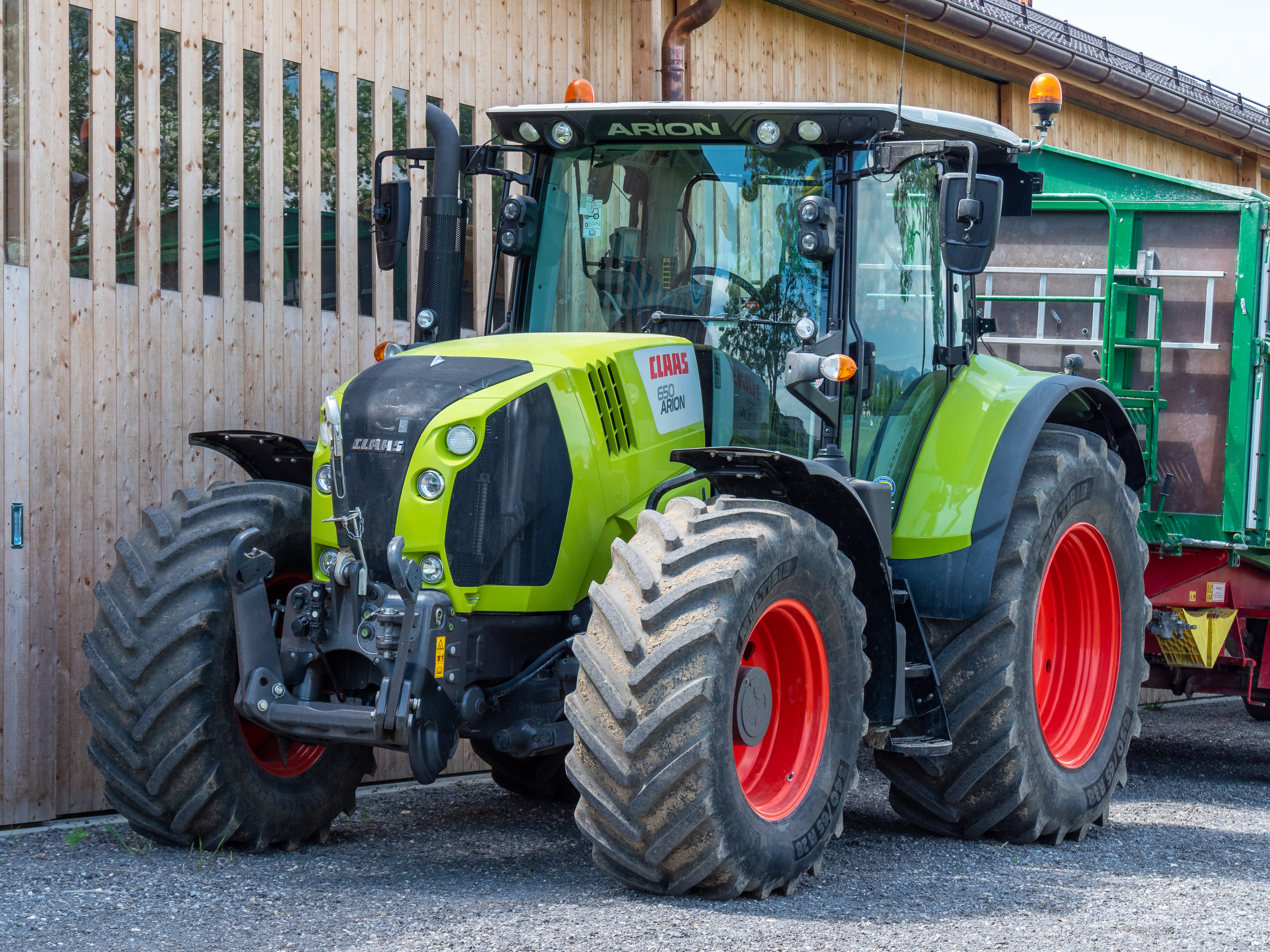 Claas Arion 650